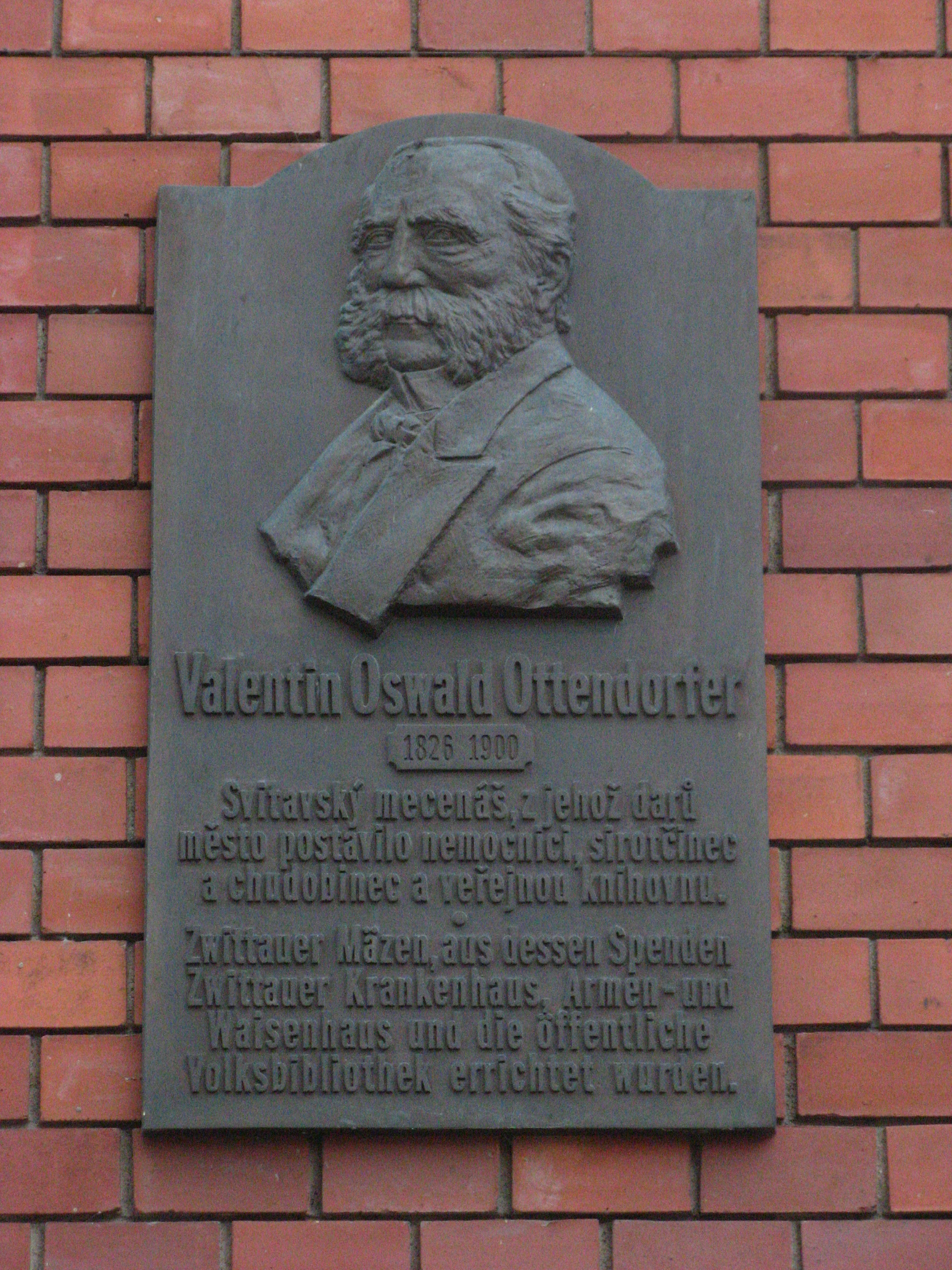 Valentin Oswald Ottendorfer (1826–1900) – plaketa, Svitavy